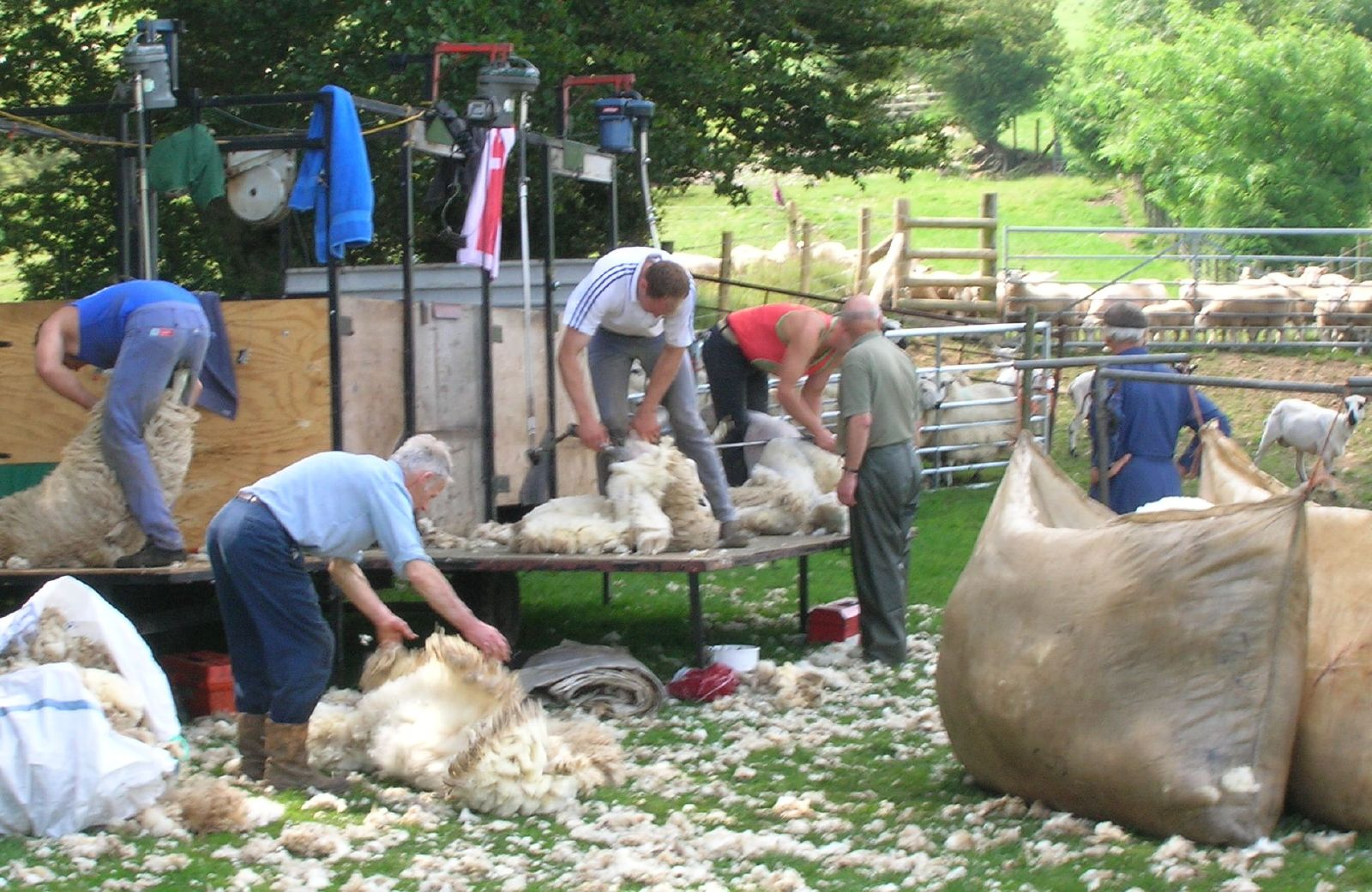 Cneifio defaid yn Llannefydd. Shearing sheep in Llannefydd